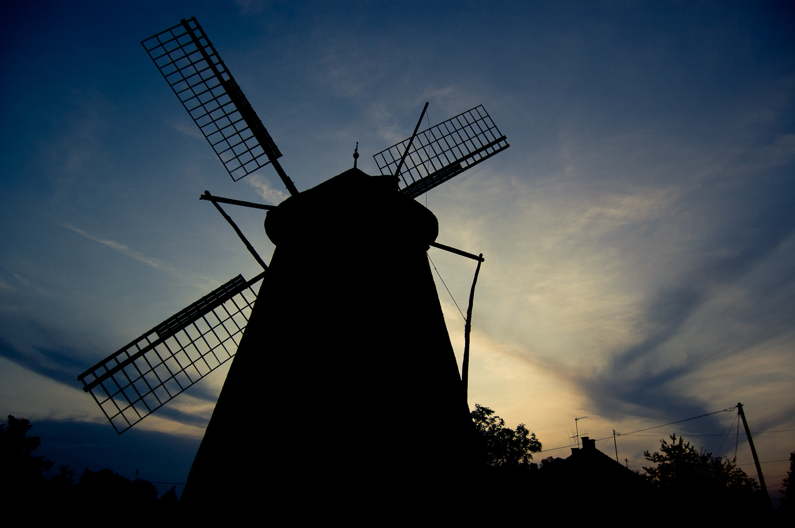 Sáfrik-féle szélmalom (Kiskunhalas, Kölcsey Ferenc utca és Szélmalom utca sarka) This is a photo of a monument in Hungary. Identifier: 2302